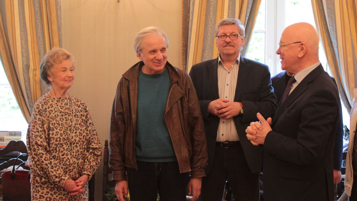 Вручение "Золотого знака" СТД РФ народной артистке СССР Юлии Константиновне Борисовой